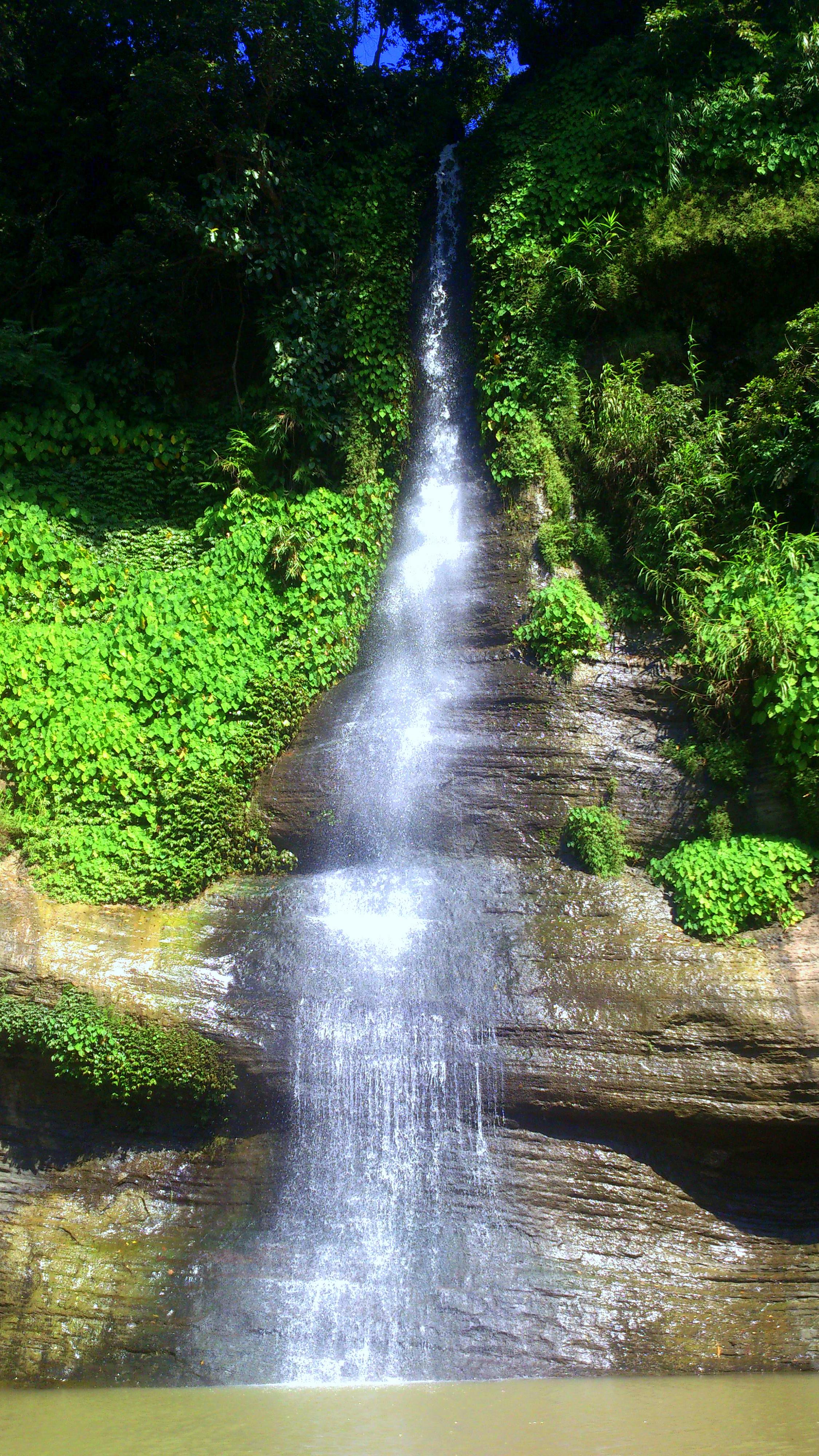 One of the two waterfalls at the Botanical Garden and Eco-Park in Sitakunda.